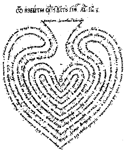 Рисуночне письмо